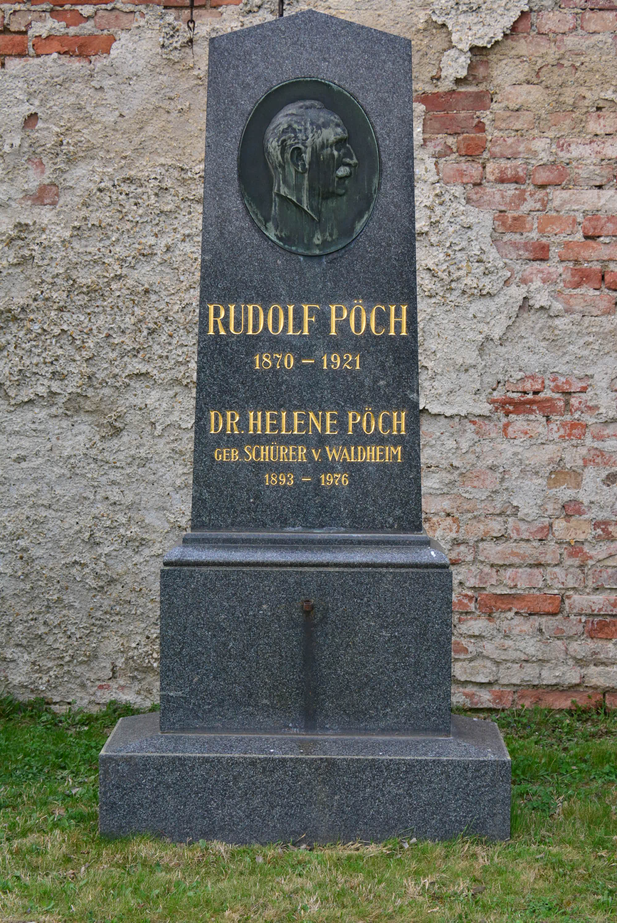 Ehrengrab von Rudolf Pöch auf dem Wiener Zentralfriedhof